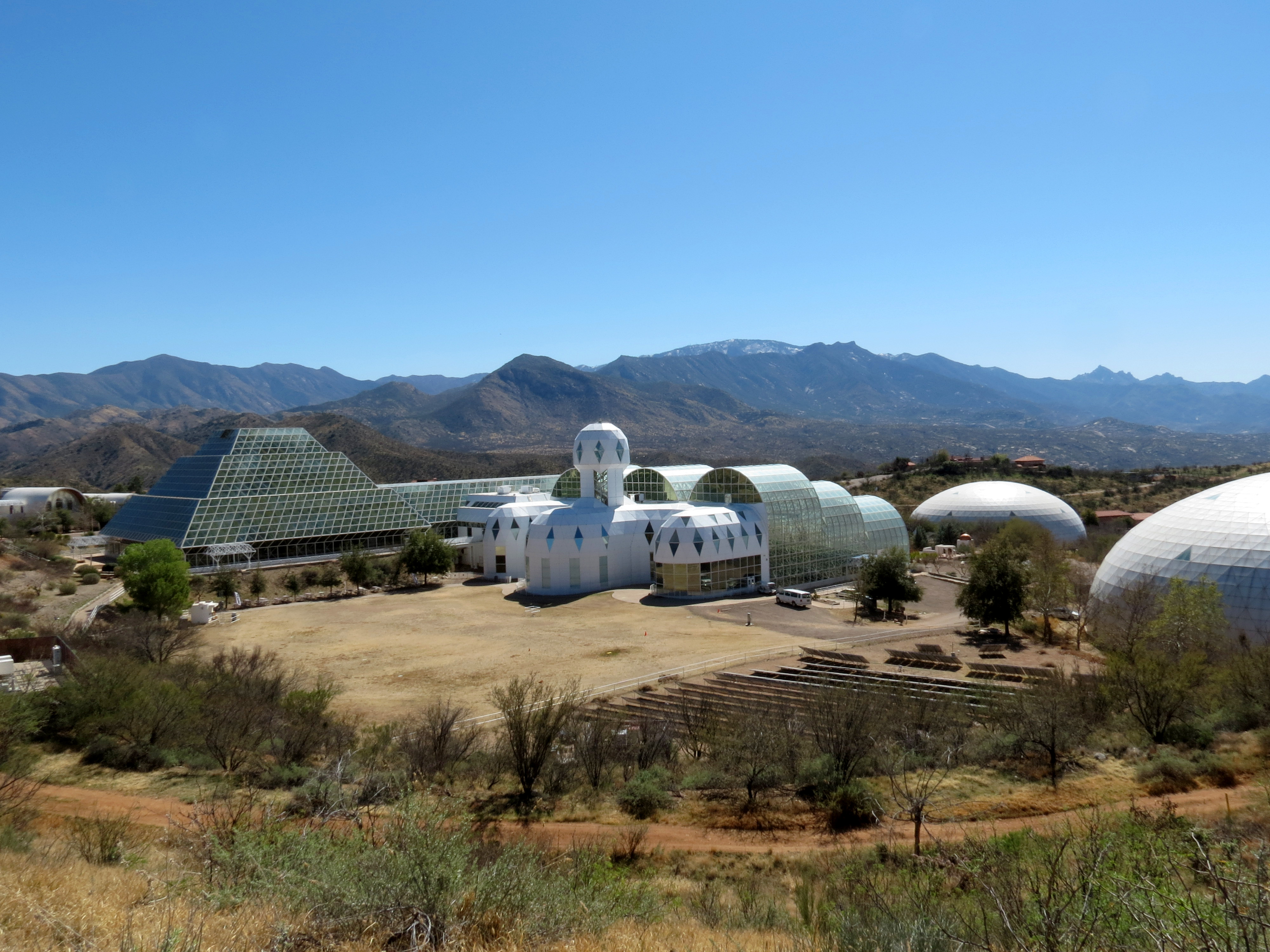 Oracle, Arizona, USA.